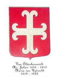 Wapen van Johan van Oldenbarnevelt (*1547-†1619)